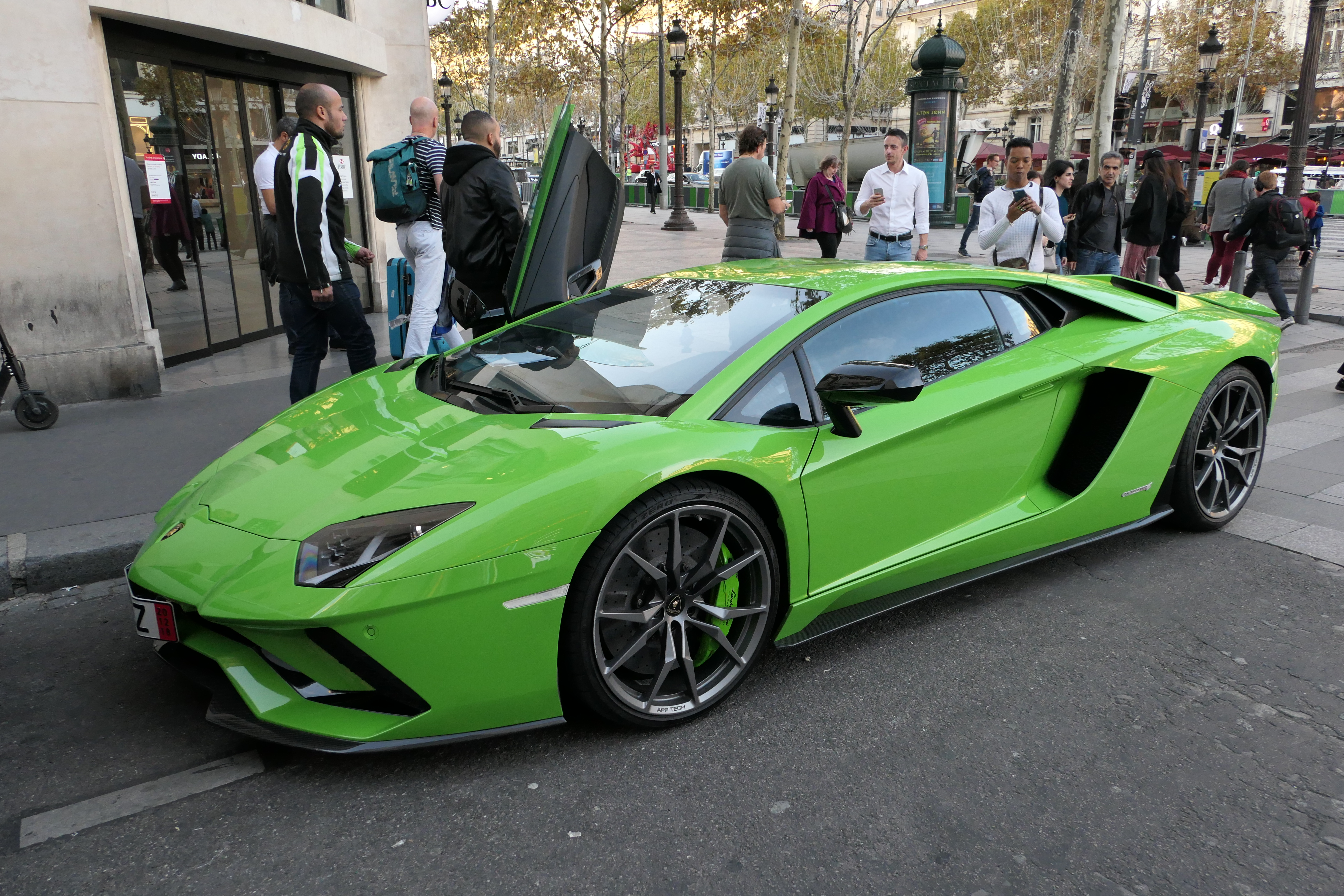 Une voiture sportive de prestige Lamborghini Aventador S Coupé verte stationnée à l’angle de l’Avenue des Champs-Elysées et de la rue de Bassano. La Lamborghini Aventador S Coupé a été mise sur le marché en 2017. Paris, France.